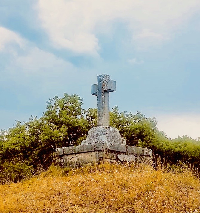 Croix Mathieu sur montjoie - Martel - © PY Redon Site sauvé de la disparition et croix en pierre et socle recréés en 1977 par Louis Blanchard et la Sauvegarde de Martel